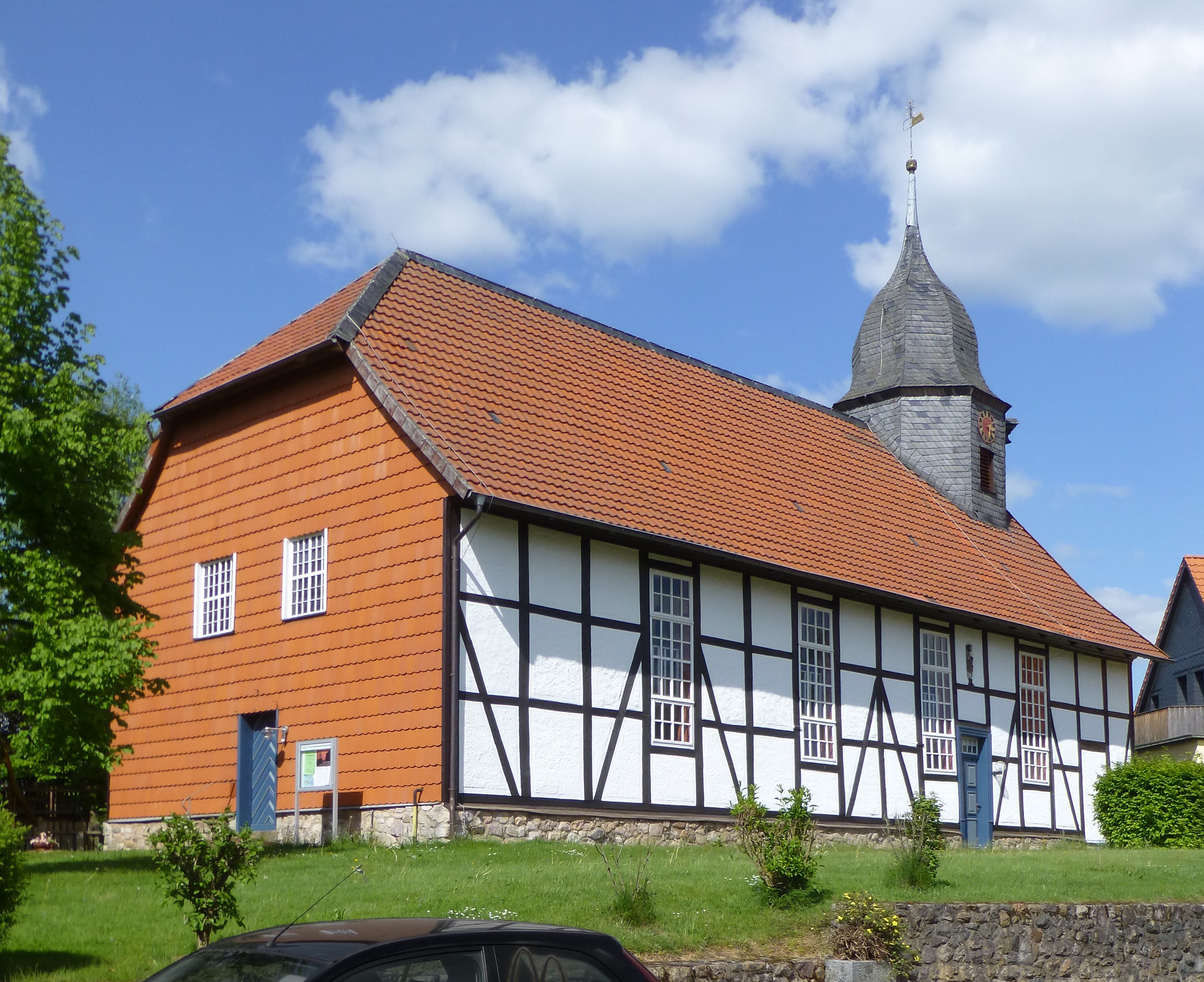 Ev.-luth. Kirche St. Petri in Elbingerode, Landkreis Osterode am Harz, Niedersachsen